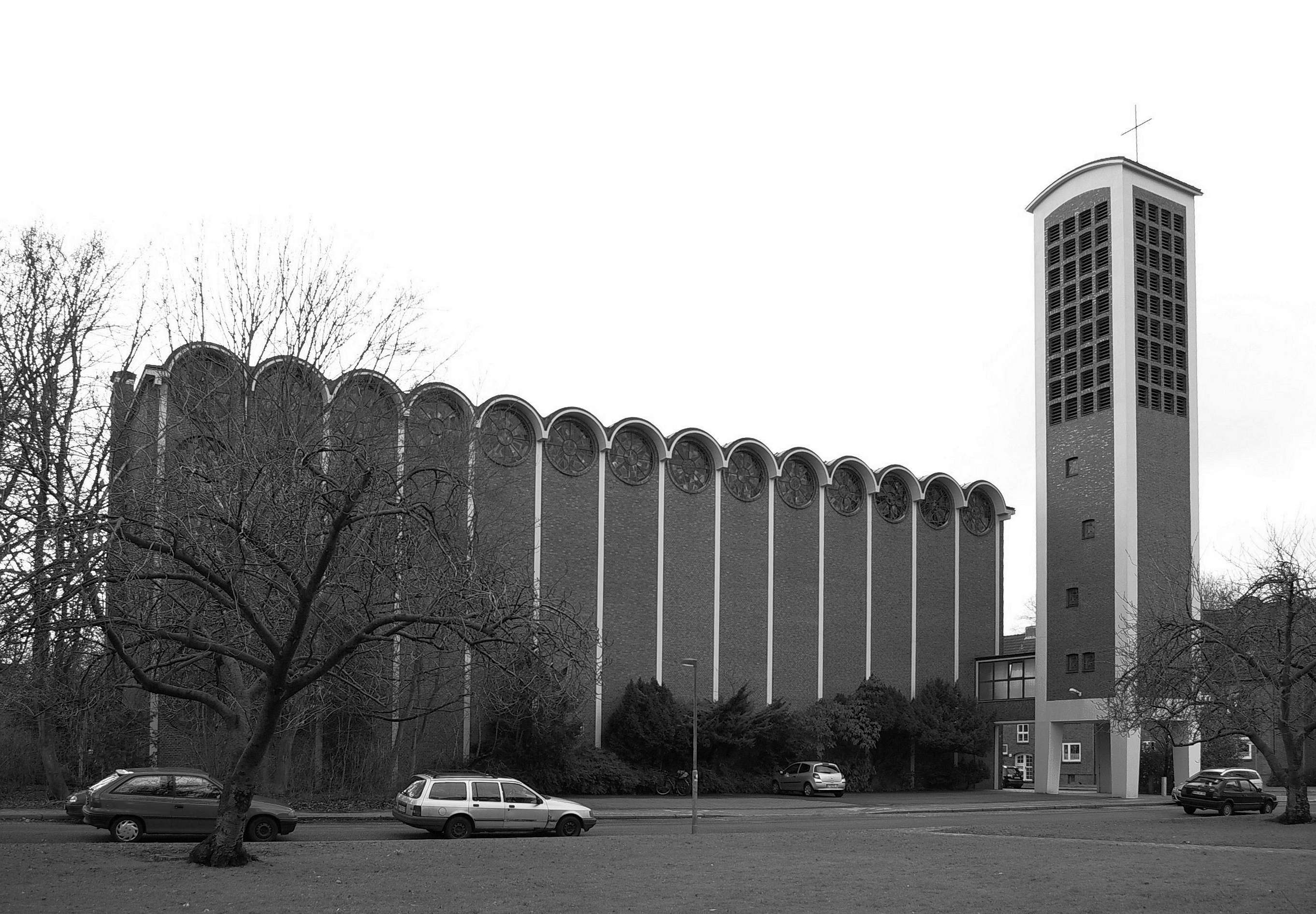 Katholische Kirche St. Marien, Otto-Meentz-Str. 23, Wilhelmshaven, erbaut 1954/56